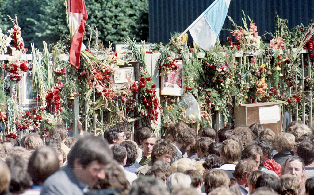 Dekoracje strajkowe na Bramie nr 2 Stoczni Gdańskiej im. Lenina; na pierwszym planie solidaryzujący się ze strajkującymi mieszkańcy Gdańska